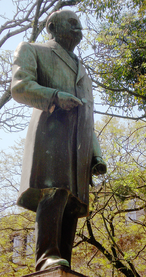 Estátua do Barão do Rio Branco, Porto Alegre, Brasil.